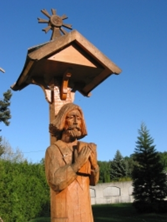 Evangelimann-Holzskulptur im Hof des Hellerhofs Paudorf